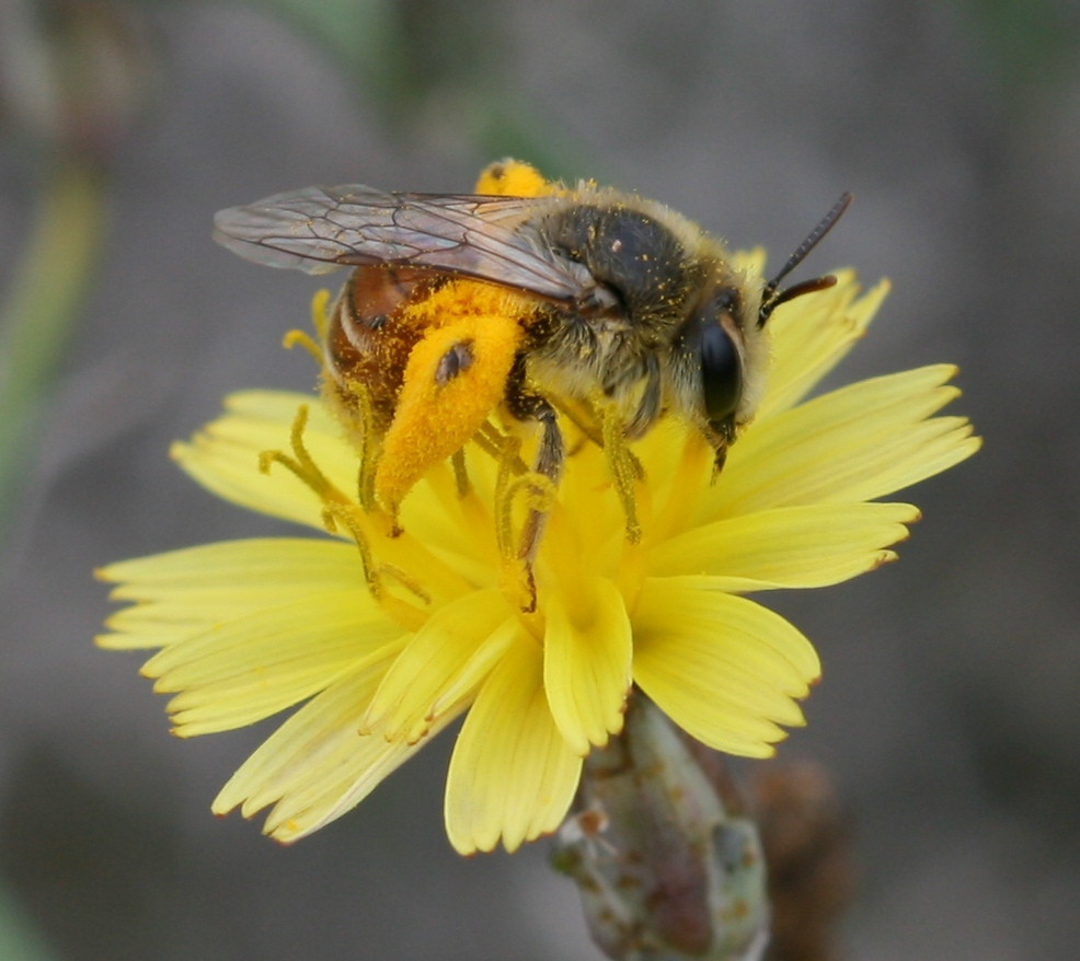 Visiting Aulaga (Launaea arborescens). Taken near Montaña Roja, Playa Blanca, Lanzarote.